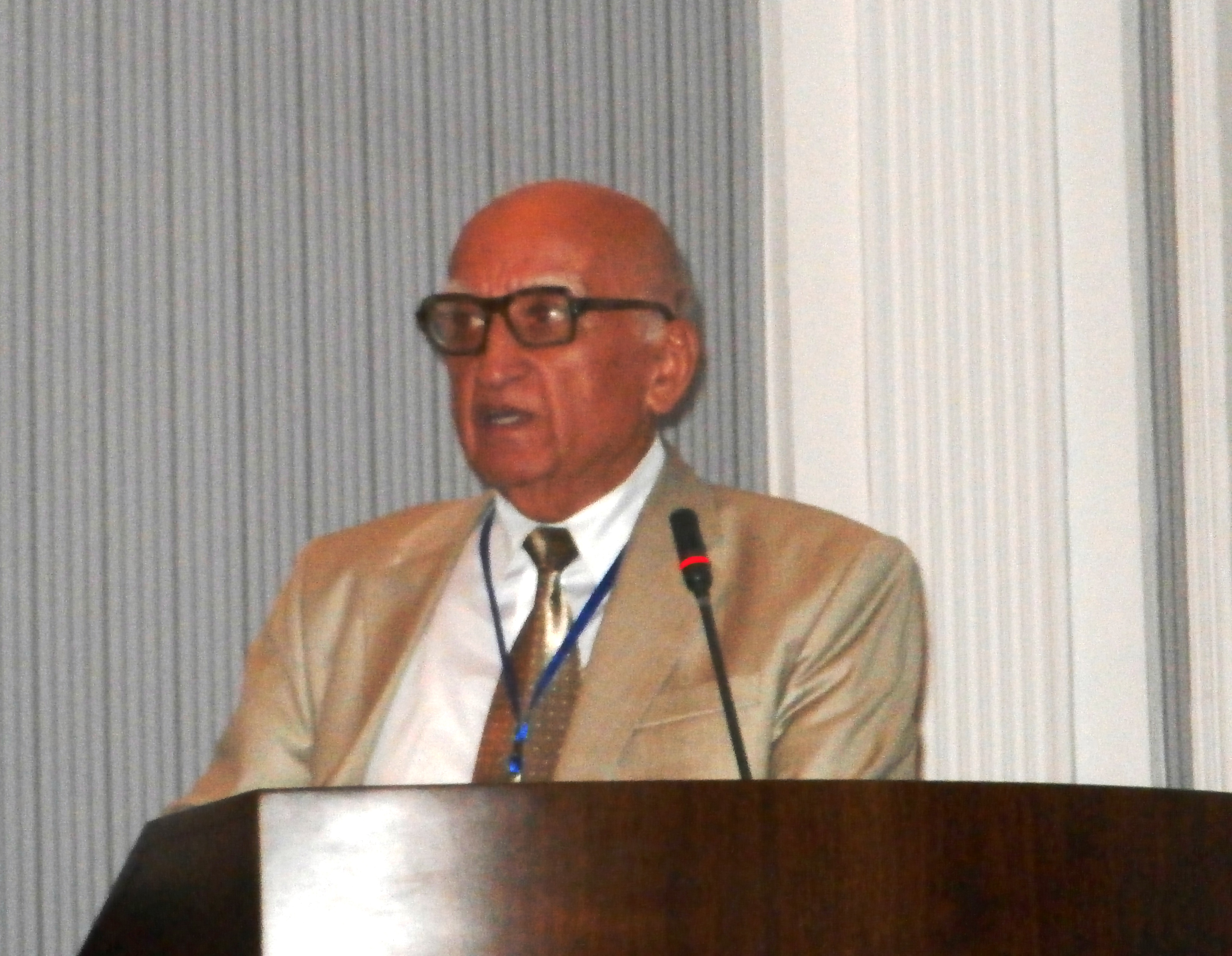 Бободжанов Ином – физик (ядерная физика), кандидат физико-математических наук, ведущий научный сотрудник Физико-Технического НИИ Академия наук Таджикистана